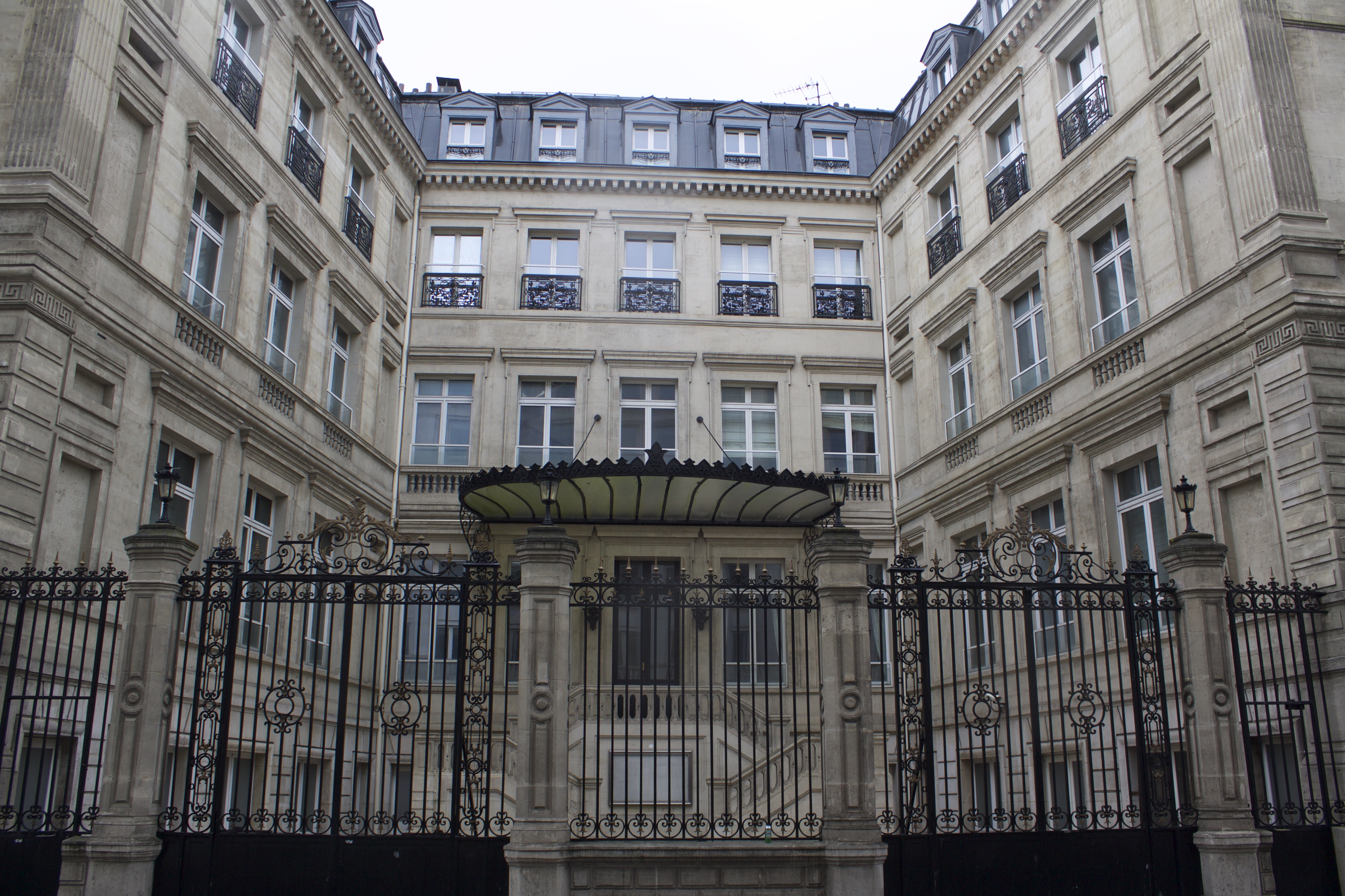 3 Rue de Tilsitt, Paris